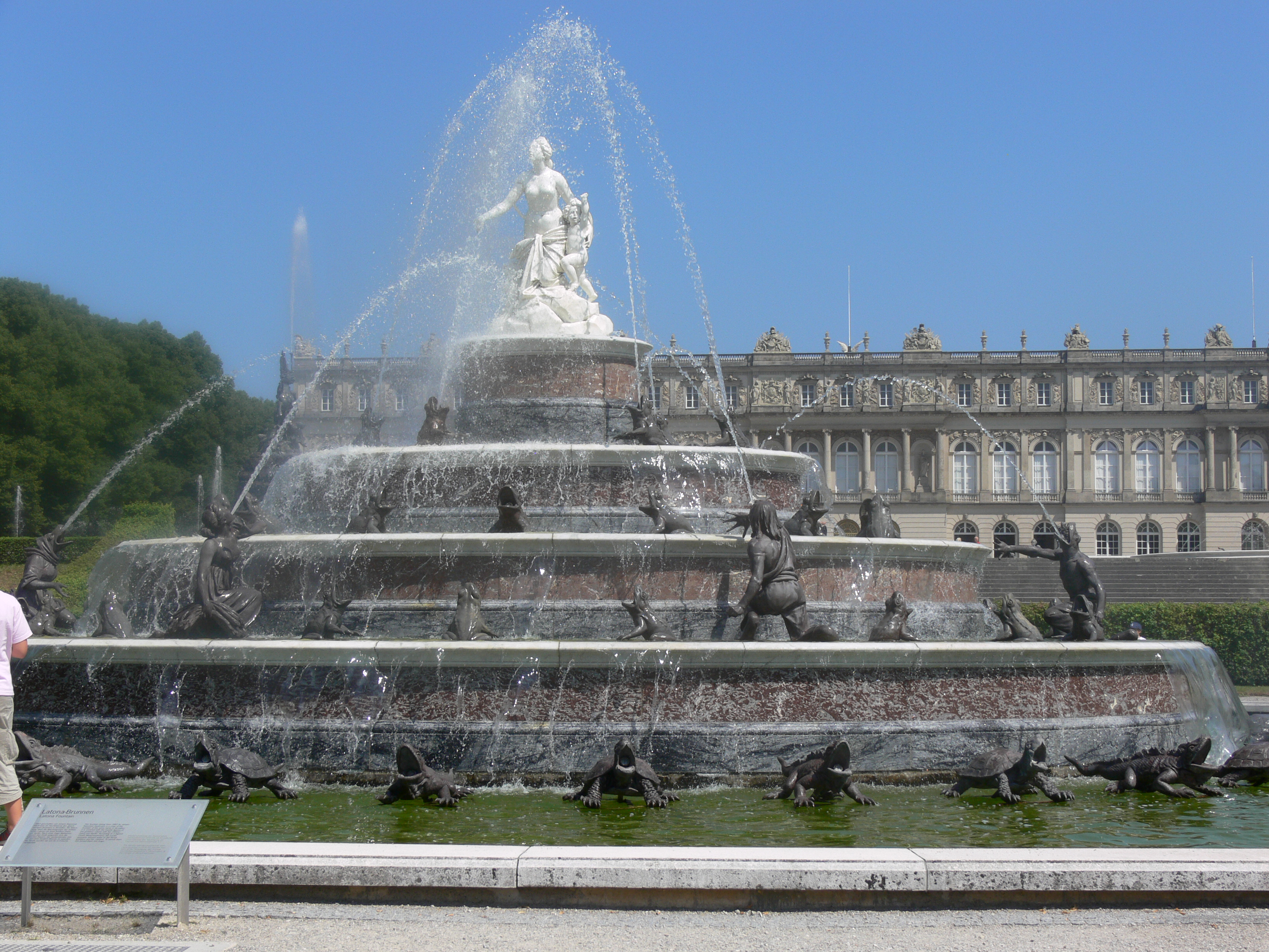 Schlosspark Herrenchiemsee, Latonabrunnen